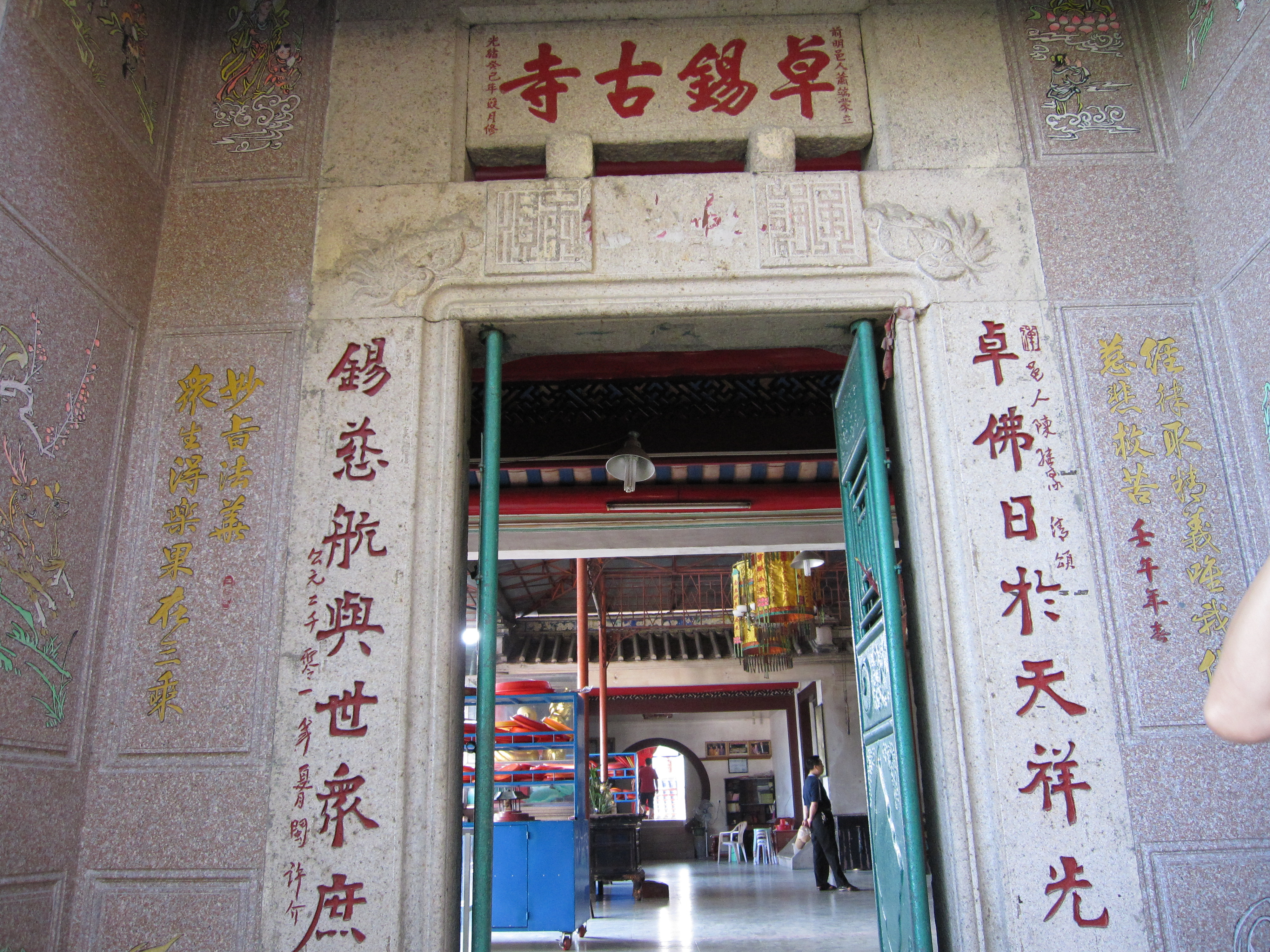 中文（中国大陆）: 寺名为萧端蒙所书